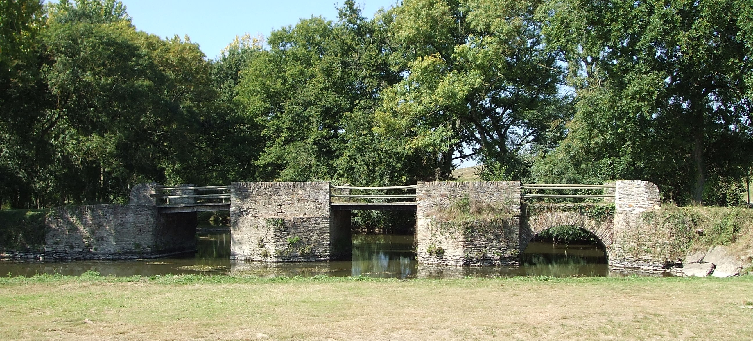 Vue de cote du Pont du Theil situe a Trans-Sur-Erdre